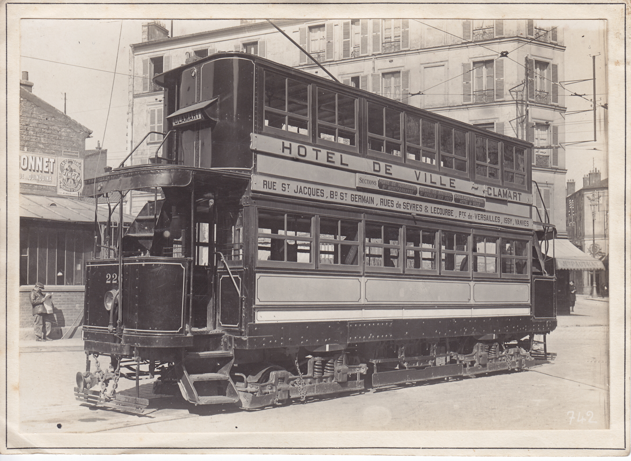 Photo ancienne sans mention d'auteur : Motrice type 200 reconstruite, n°226, dans un dépôt de la CGPT